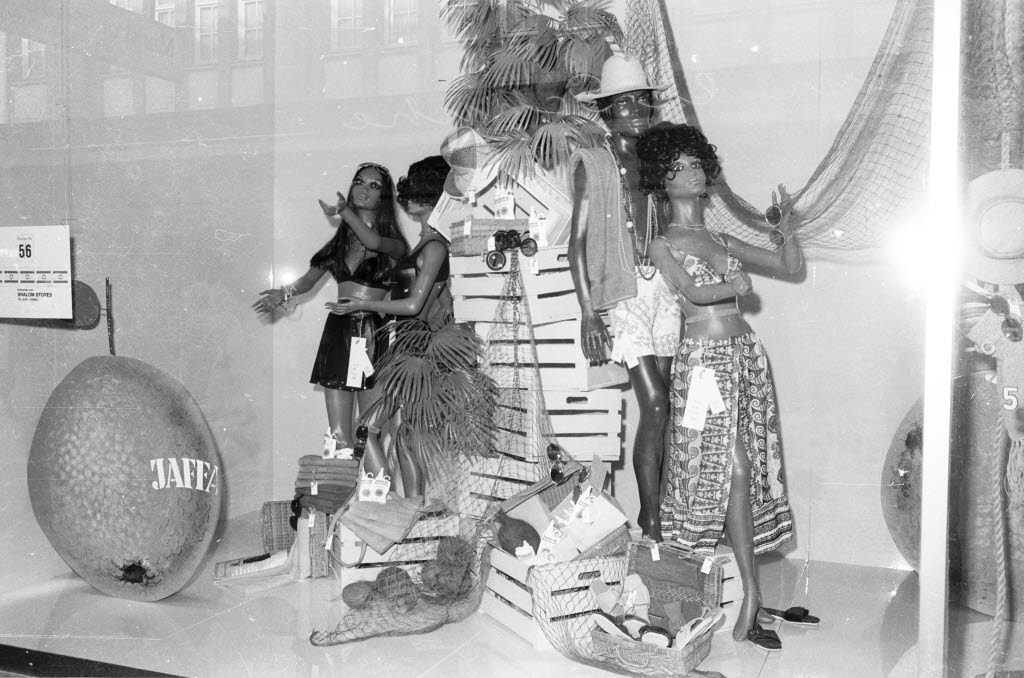 Beitrag aus Israel.